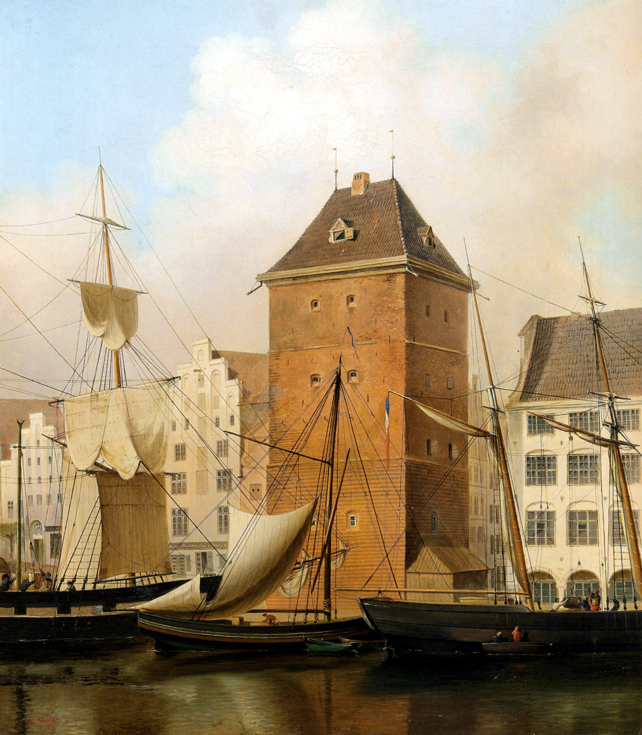 Der Blaue Turm in Lübeck, abgebrochen 1853